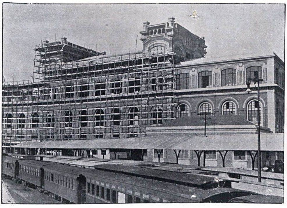 Vista das obras da estação São Paulo da Sorocabana Railway Company.